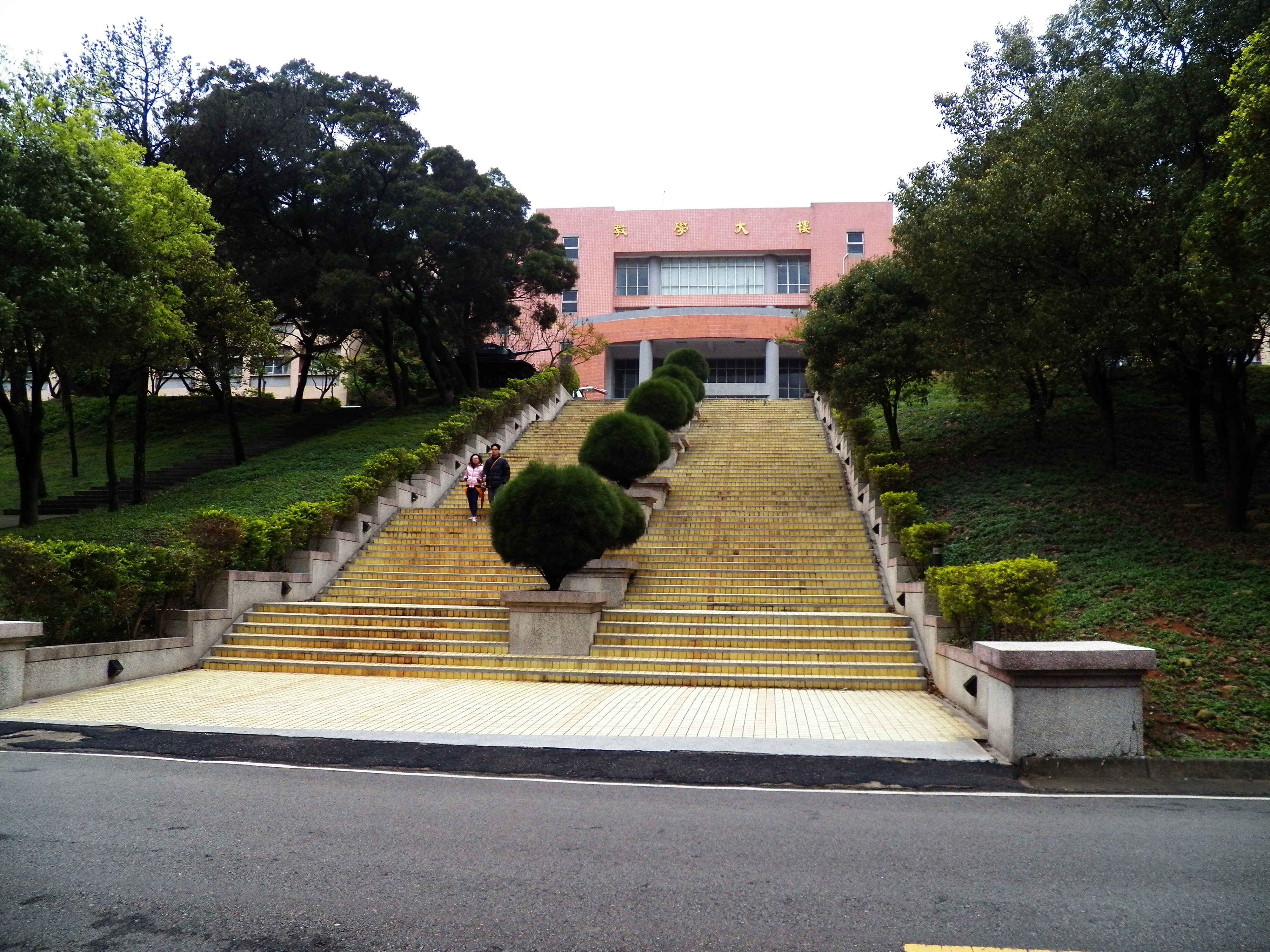 中文（台灣）: 裝甲兵學校教學大樓正面遠景。